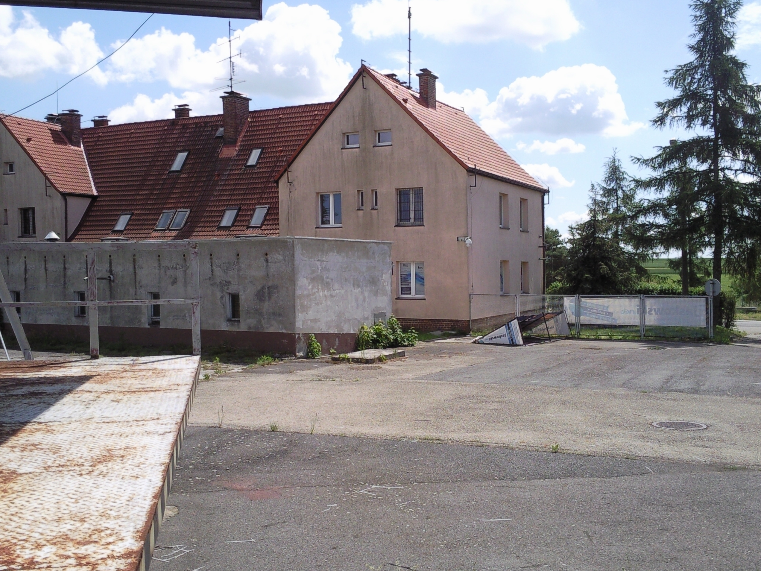 Przejście graniczne Pietraszyn-Sudice i Graniczna Placówka Kontrolna Straży Granicznej w Pietraszynie, potem Placówka Straży Granicznej w Pietraszynie - widok od strony placu